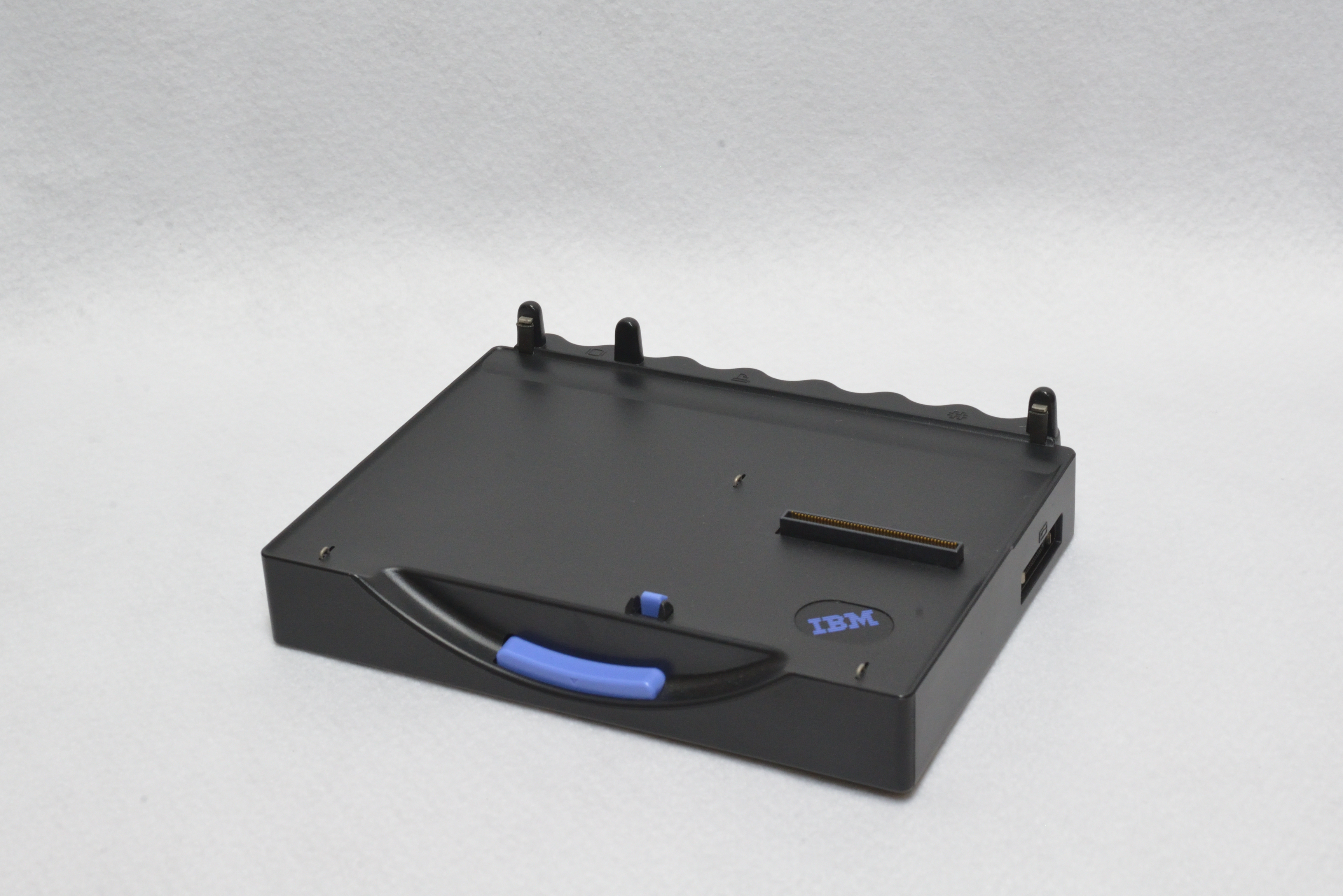 IBM Palm Top PC 110 ポートリプリケータ（通称ポトリ）